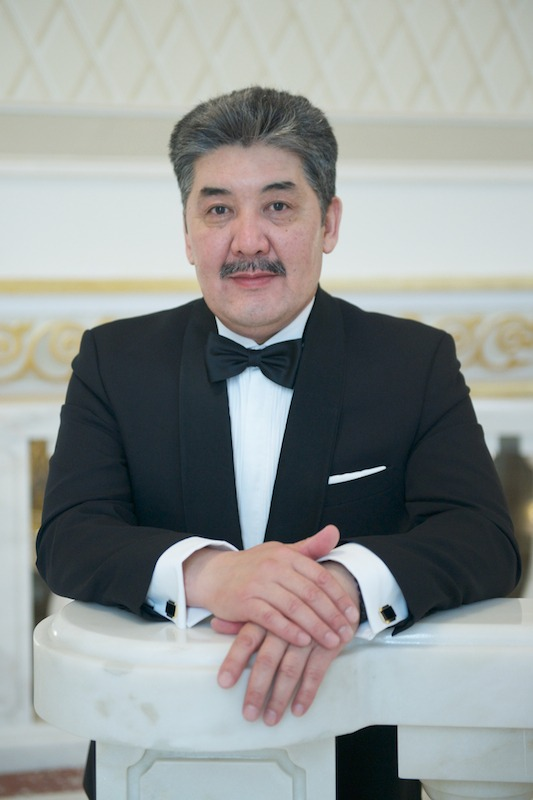 Фото Жаната Бахытжановича в театре Астана Опера